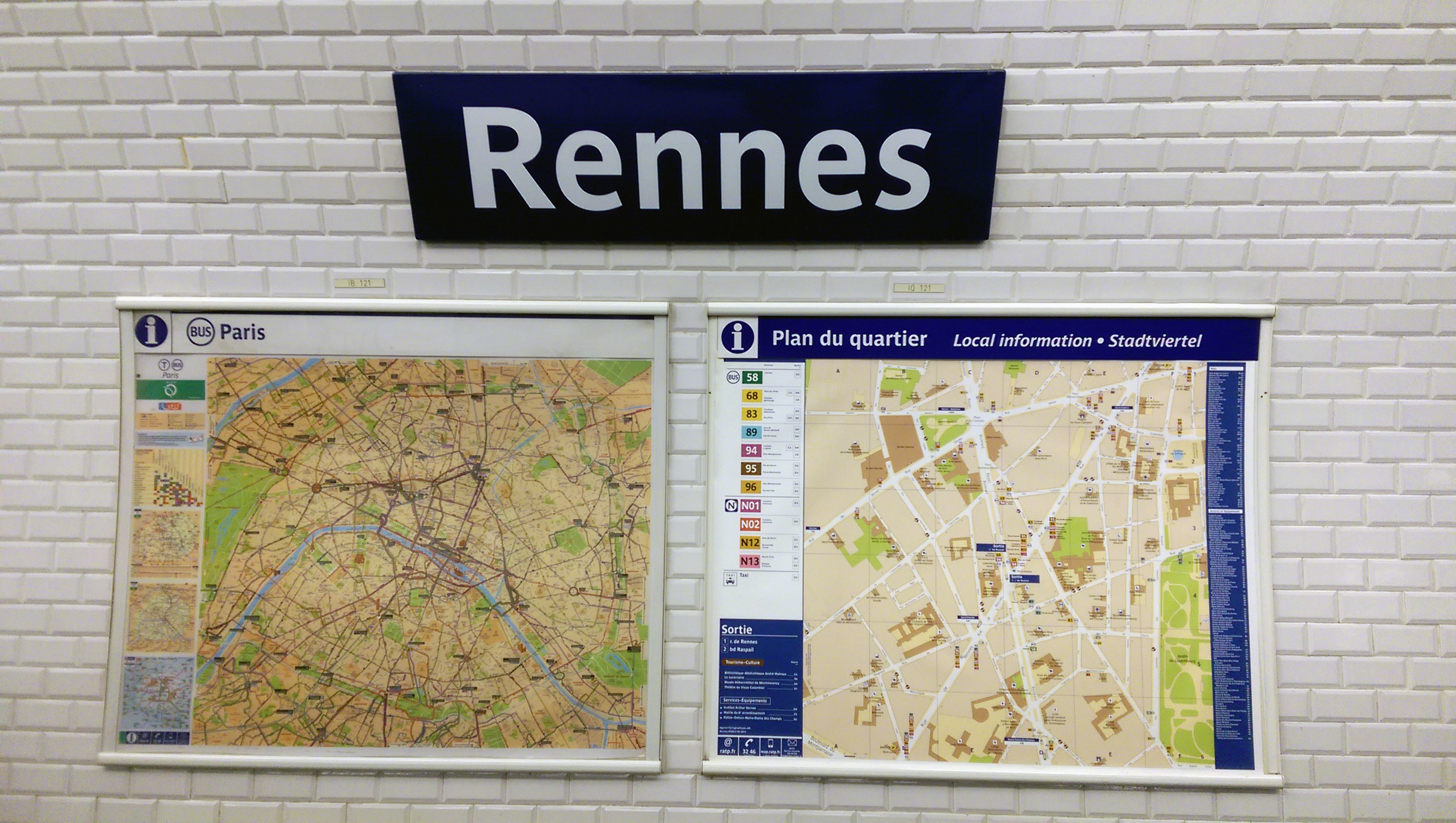 Le panneau de la station Rennes, situé sur la ligne 12 du métro parisien.